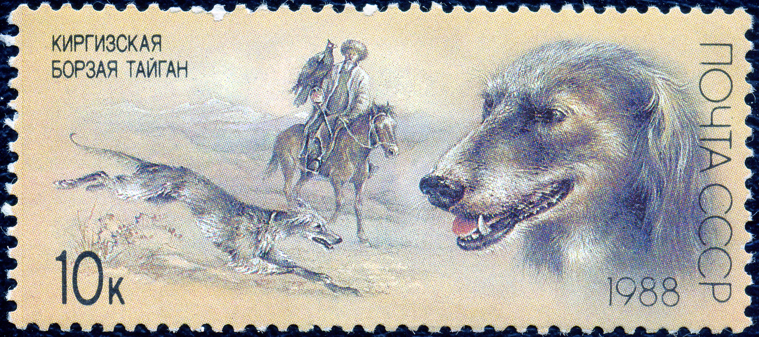 Почтовая марка СССР. 1988. Киргизская борзая тайган